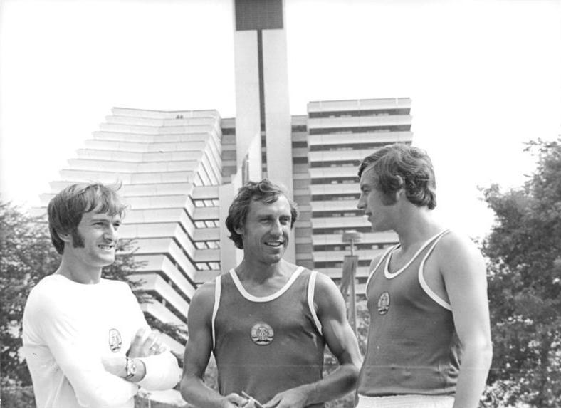 ADN-ZB Gahlbeck 16.7.76 Montreal: XXI. Olympische Sommerspiele-Der 34 jährige Geher Hans-Georg Reimann vom SC Dynamo Berlin (M.), der bereits das vierte mal an Olympischen Spielen teilnimmt und 1972 über 20 km die Bronzemedaille gewann, wird zur feierlichen Eröffnung am 17.7. die DDR-Fahne in das Montraler Olympiastadtion tragen. Unser Foto zeigt ihn auf den Straßen des Olympischen Dorfes im Gespräch mit seinen Mannschaftskameraden Karl-Heinz Stadtmüller (Gehen, r.) und Waldemar Cierpinski (Marathon).